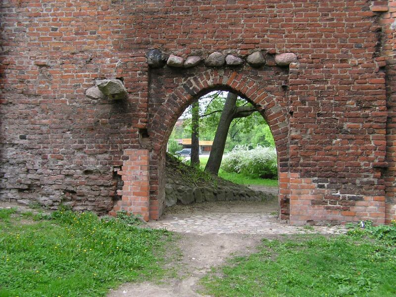 Olsztyn - mury obronne